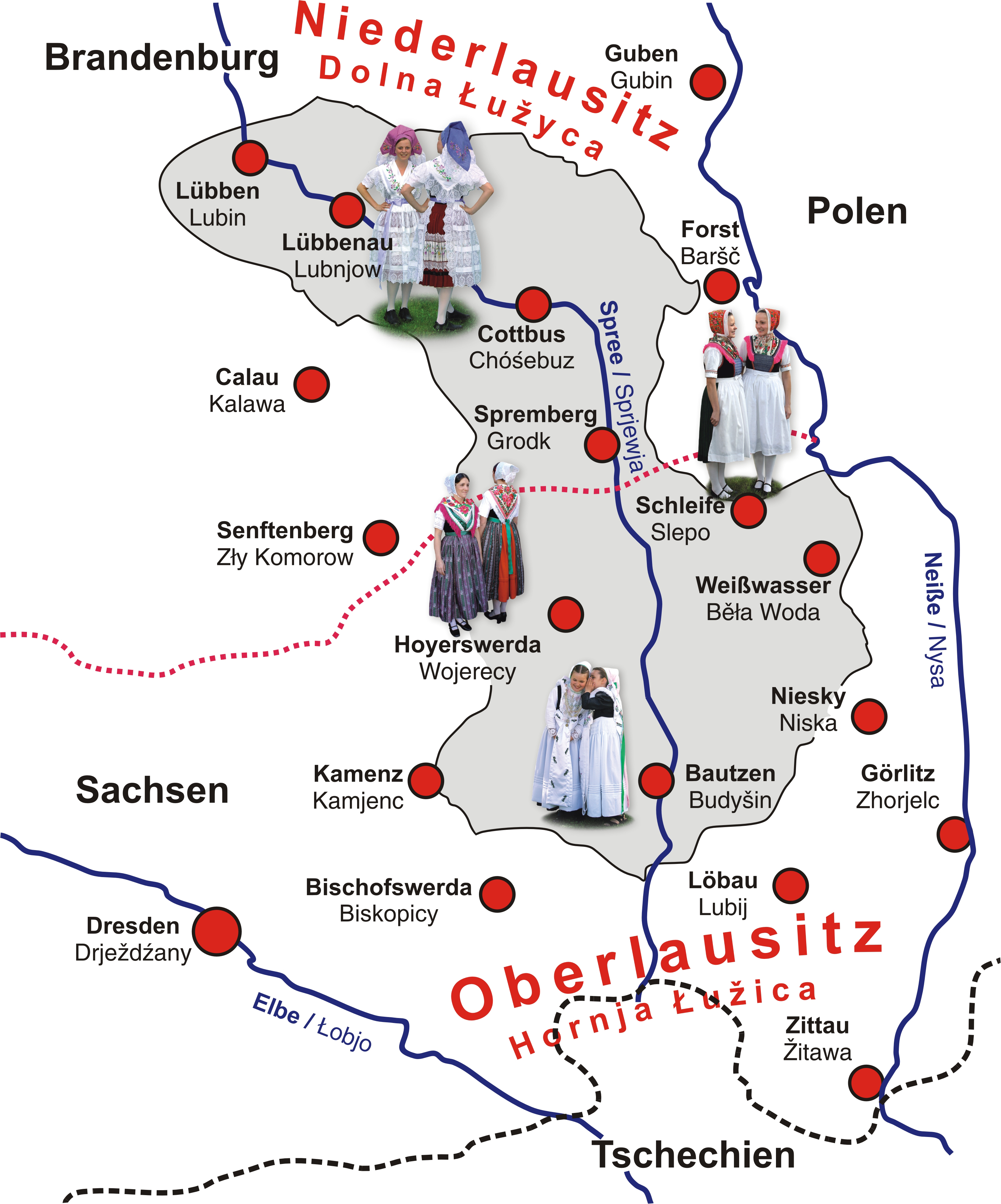 Sorbisches Trachtengebiet mit der Verteilung der vier noch täglich getragenen Trachten